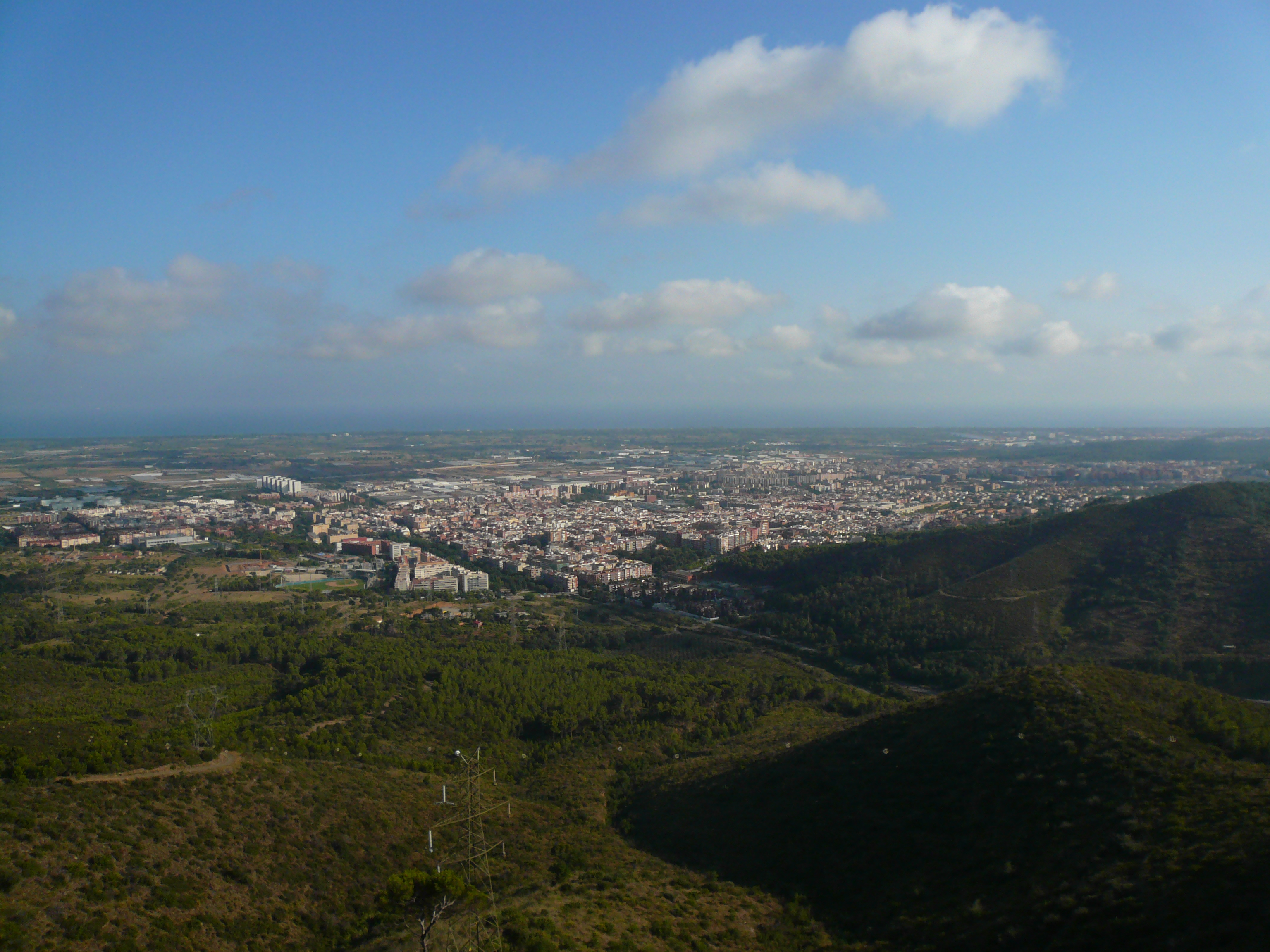 Vista des de l'ermita de Sant Ramon, al cim del Montbaig (Sant Boi de Llobregat).